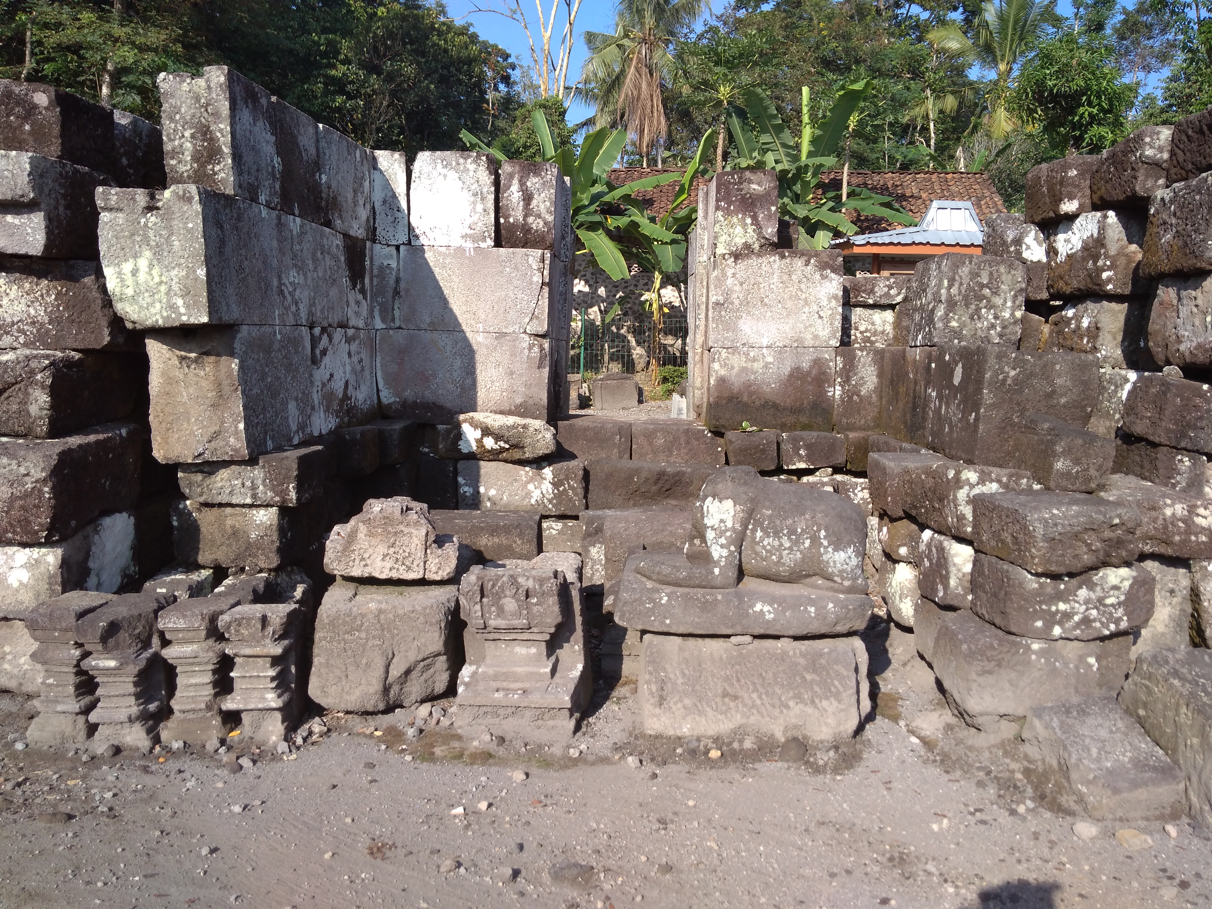 Reruntuhan Candi Morangan